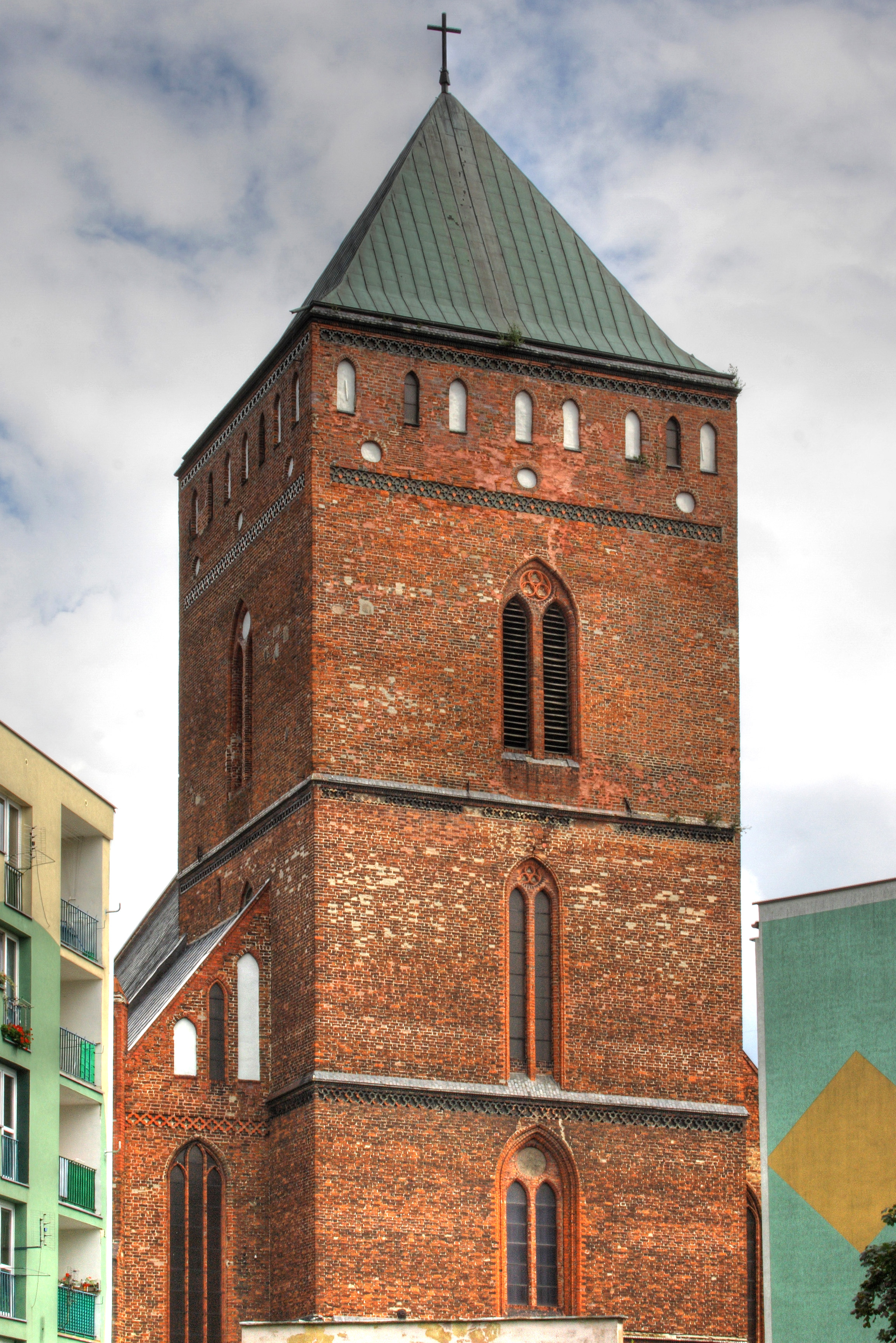 Wieża kościoła św. Katarzyny w Goleniowie